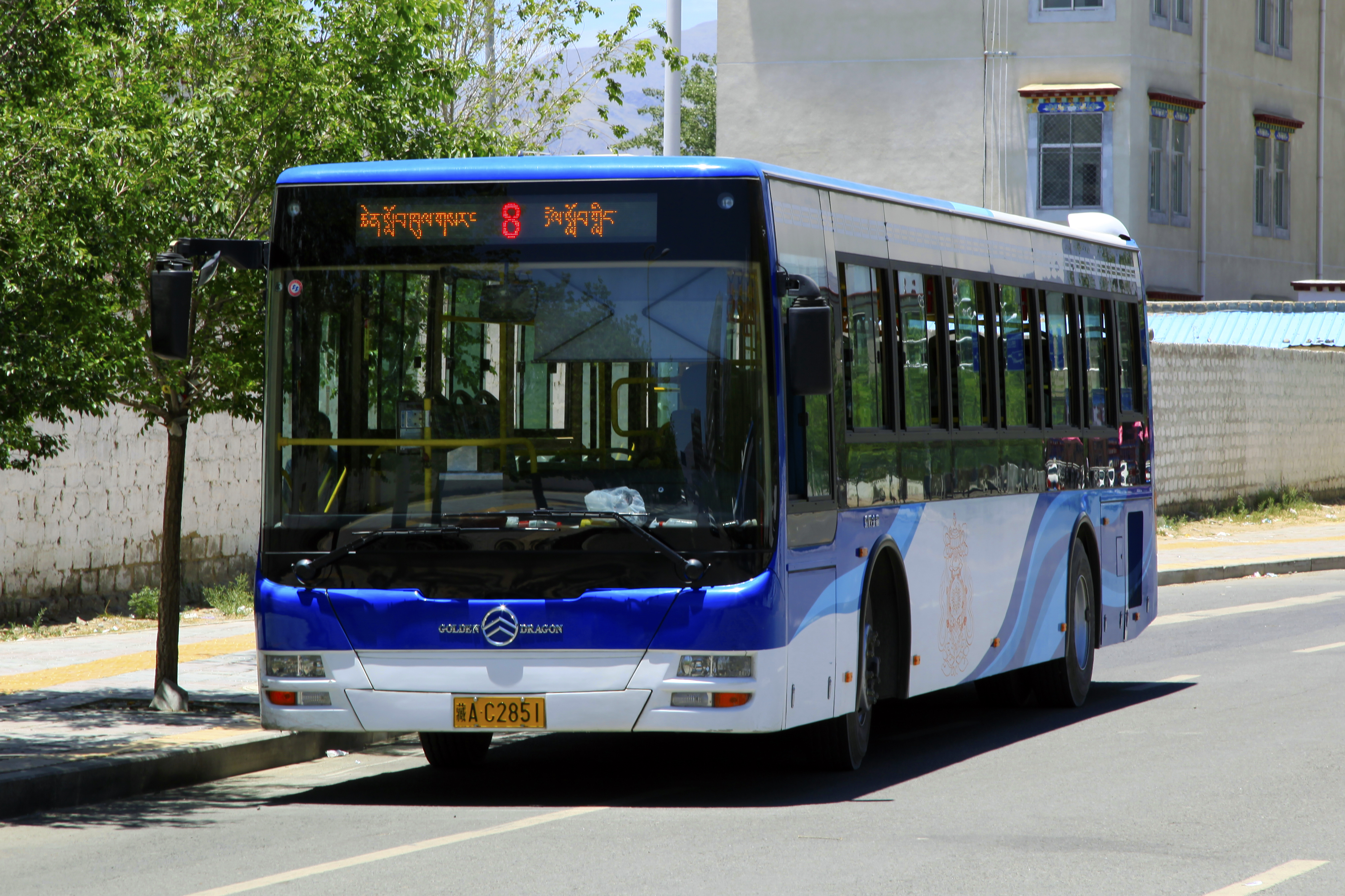 Lhasa Bus 8 | Golden Dragon | XML6125J18C | ZangDa Road(East) 拉薩公交8路 | 廈門金旅客車 | XML6125J18C | 藏大東路 熱嘎曲果路